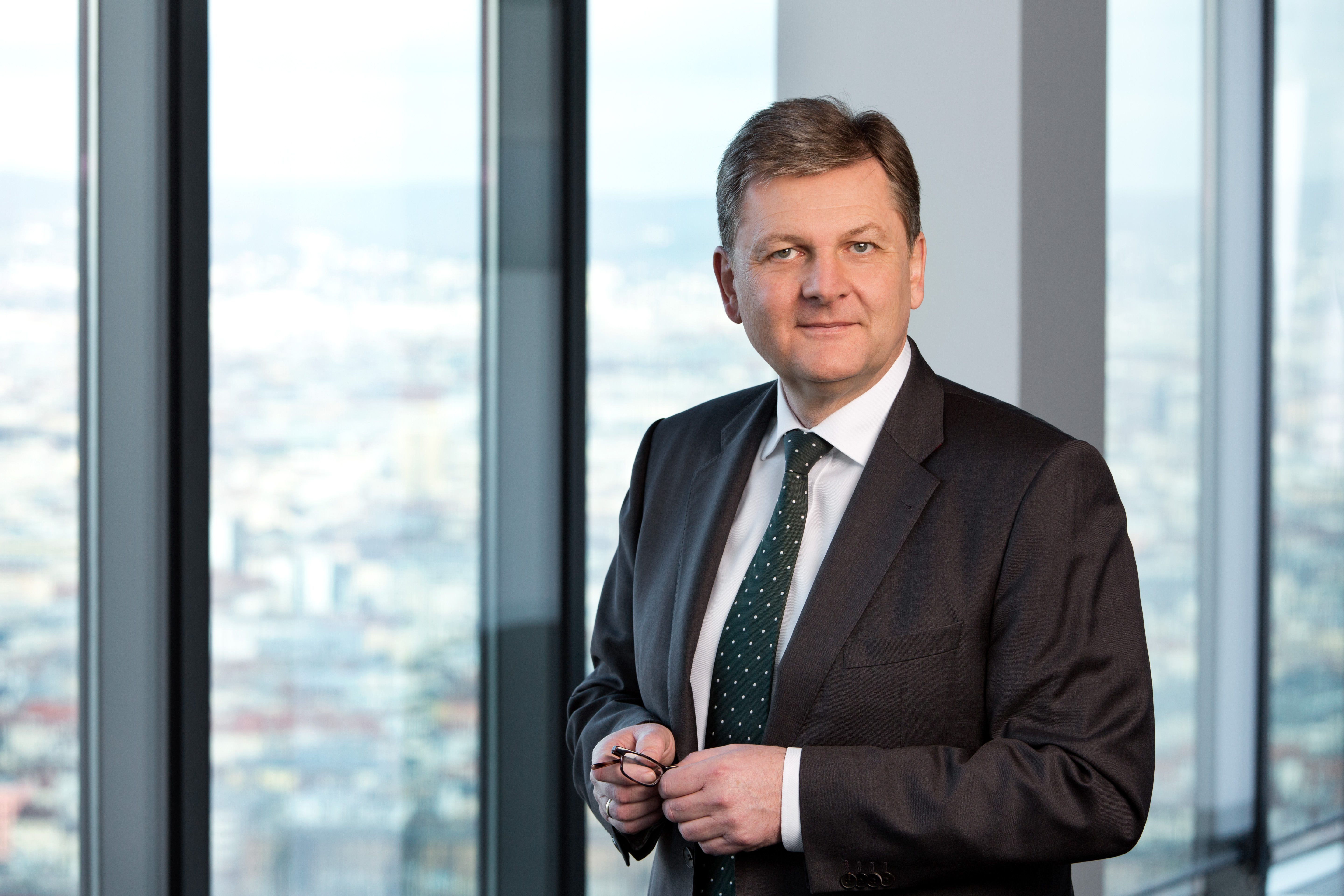 Reinhard Wolf (Manager)